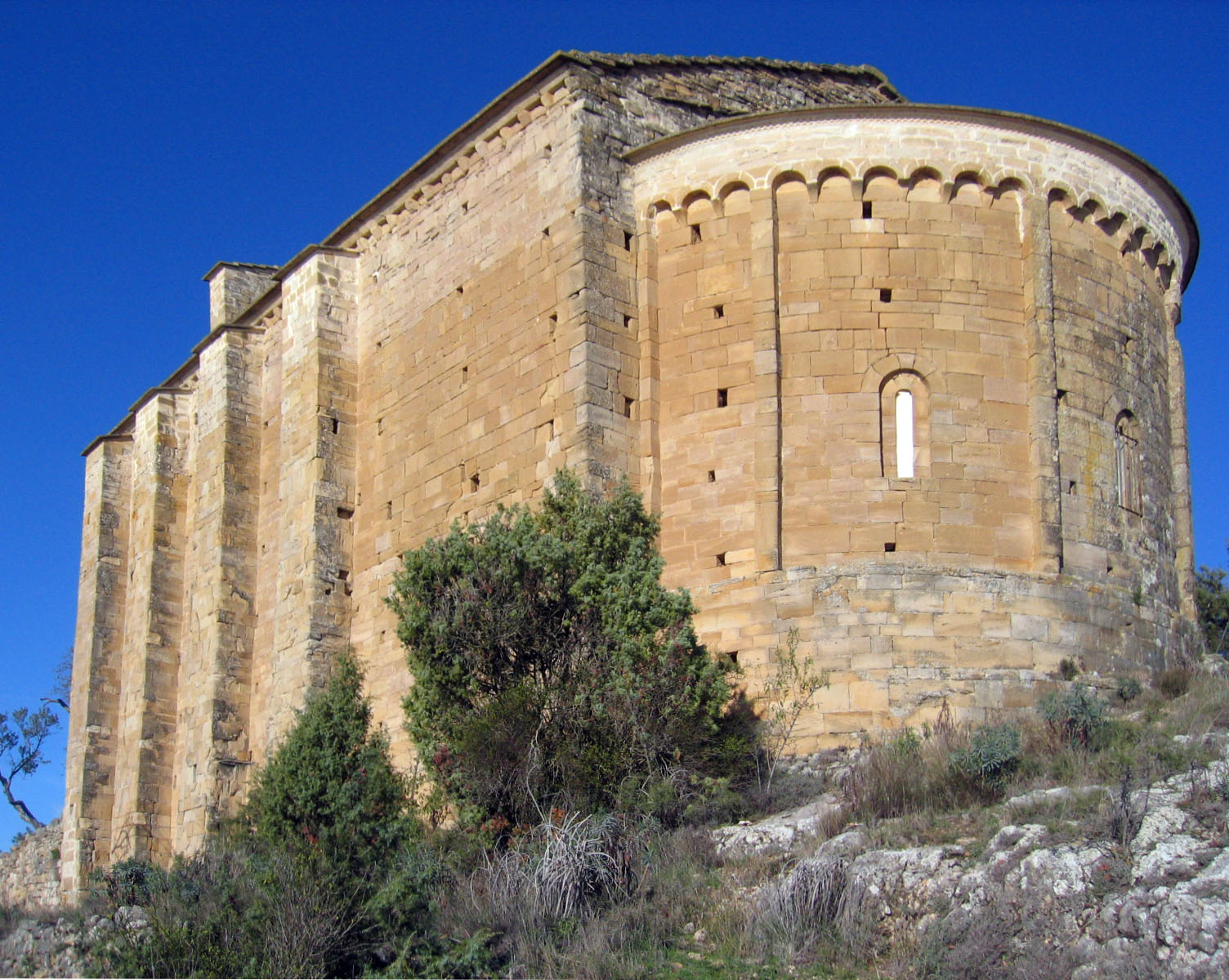 Se trata de una monumental ermita románica del s.XIII situada sobre el Congosto de Olvena, que en origen fue la capilla de un castillo, del que aún quedan algunos vestigios. Su planta consta de amplia nave única cubierta con bóveda de cañón con fajones y ábside semicircular cubierto con bóveda de horno, en el que se abren tres ventanas de medio punto abocinadas. A los pies presenta, bajo el coro alto, un magnífico alfarje sostenido por un gran arco diafragma rebajado. Esta techumbre de madera está decorada al temple con motivos vegetales, animales, geométricos, heráldicos y figurativos de tradición mudéjar. Su fábrica es de sillar y presenta potentes contrafuertes al exterior. Existen tres ingresos actualmente, el principal en el hastial occidental, sobre el que existe una ventana y una espadaña de doble vano, y dos más en los muros laterales, como medio de comunicación con el resto de las dependencias del castillo. En el exterior del ábside se observa un friso decorativo de arquillos ciegos de tradición lombarda.